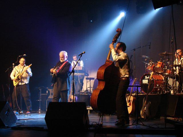 Hasse Andersson & Kvinnaböske Band på scenen i enöping den 18/3 2007